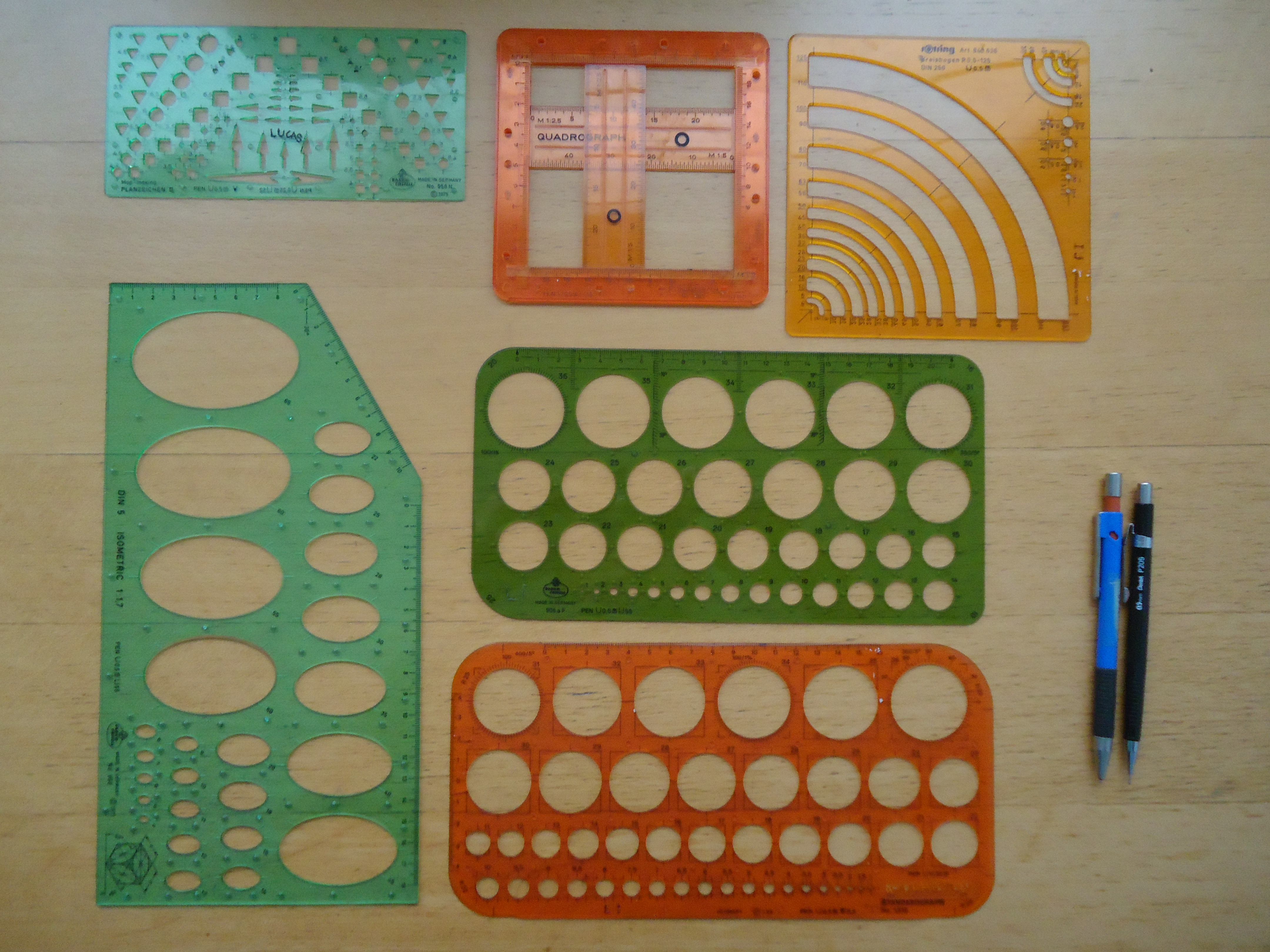 Plantillas de círculos, elipses, y flechas, con una plantilla deslizante para dibujar rectángulos a medida